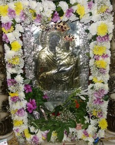 Η Θαυματουργή εικόνα της Παναγίας της Φανερωμένης ή Νεοφανείσας